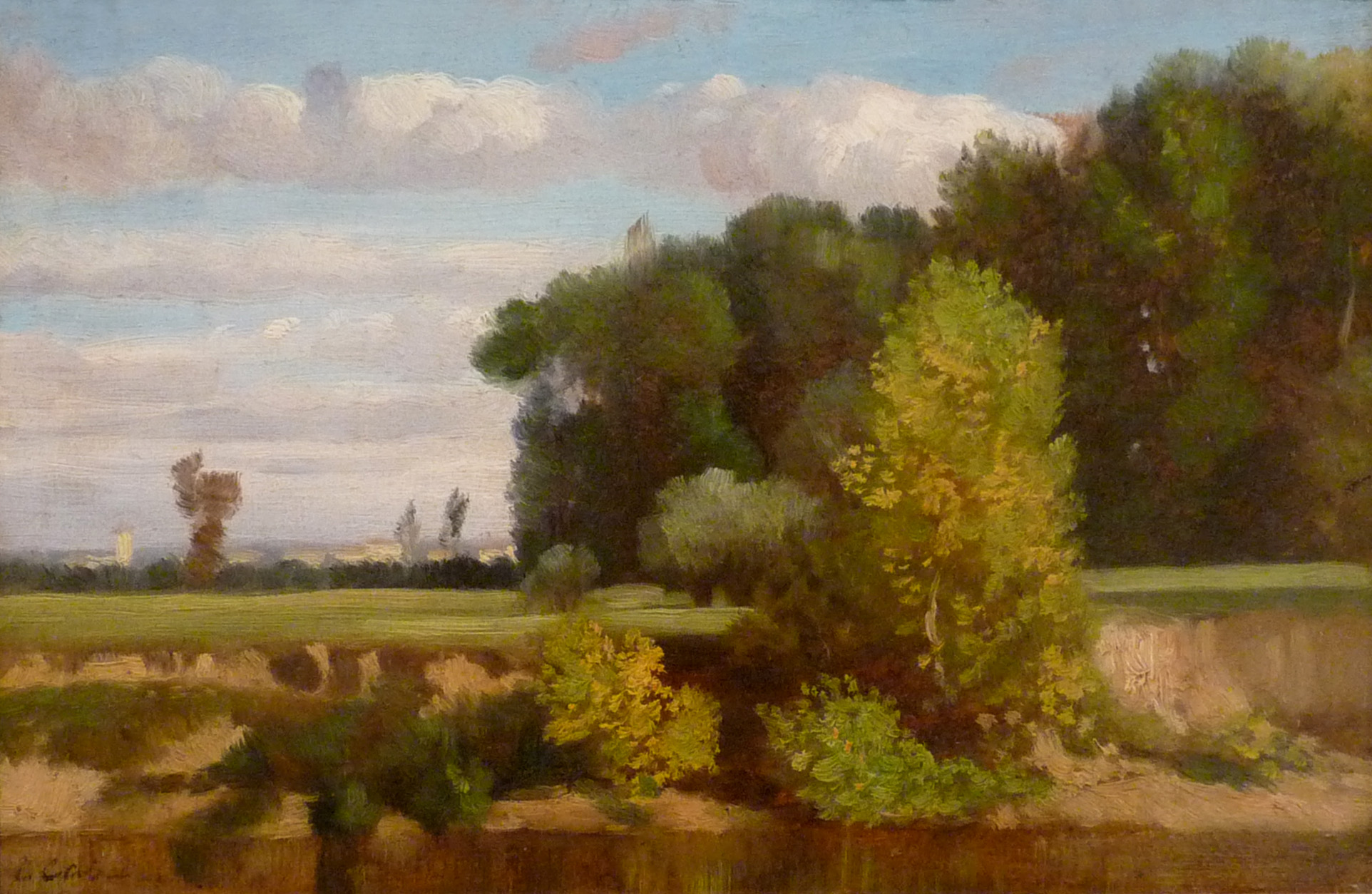 Louis Cabat, Paysage, huile sur toile, Musée des beaux-arts de Strasbourg.